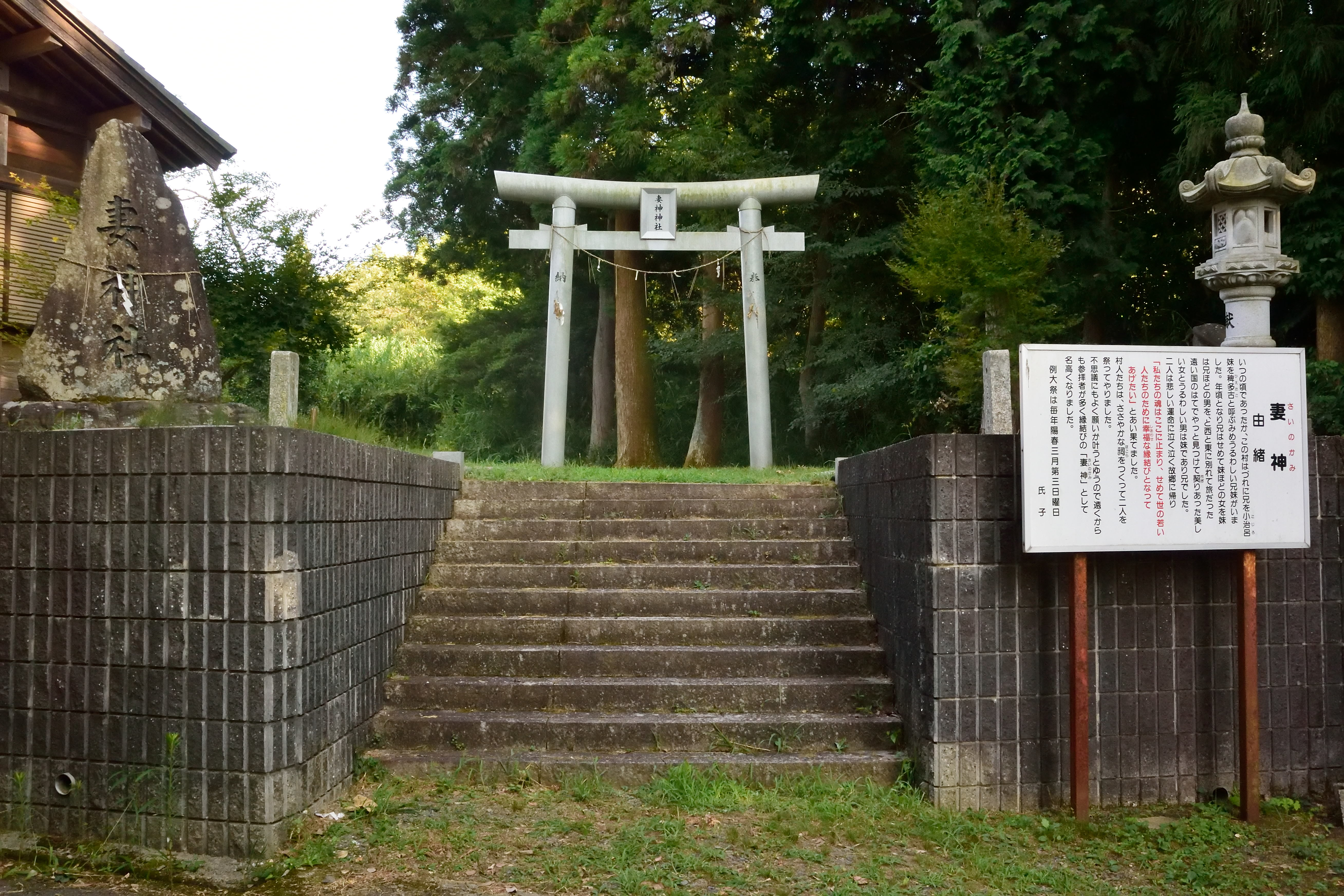 妻神社入口